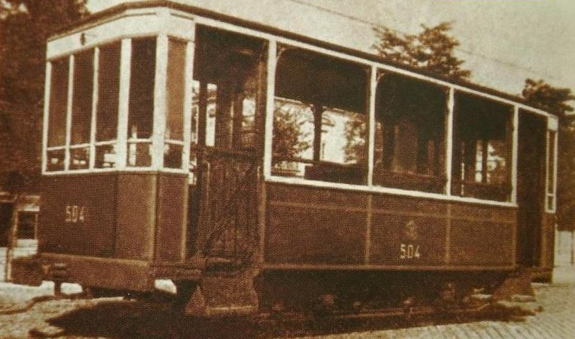 Двуосен вагон "Кардалев"